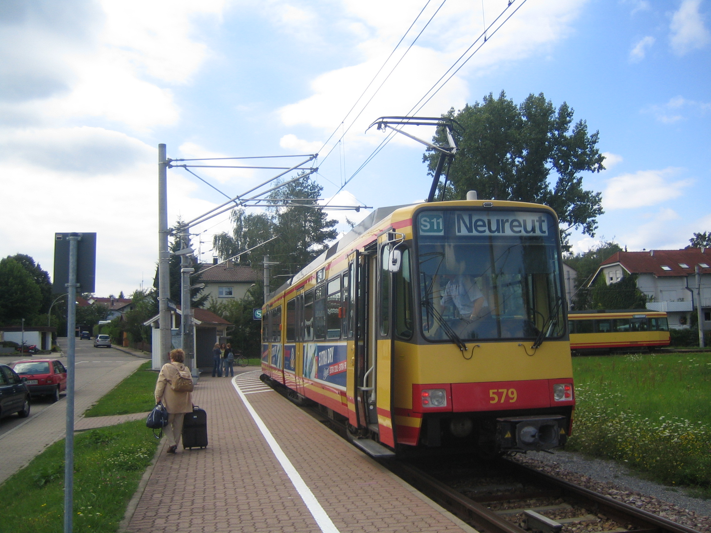 Endhaltestelle "Ittersbach Rathaus" der Albtalbahn-Zweigstrecke Busenbach-Ittersbach, selbst fotografiert